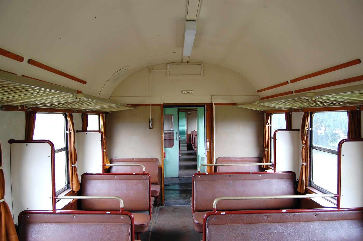 Innenansicht eines Umbauwagens der Gattung B3yg (88 166) der Museumseisenbahn Hanau e. V.